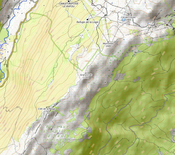 carte réalisée sur umap This map may be incomplete, and may contain errors. Don't rely solely on it for navigation.